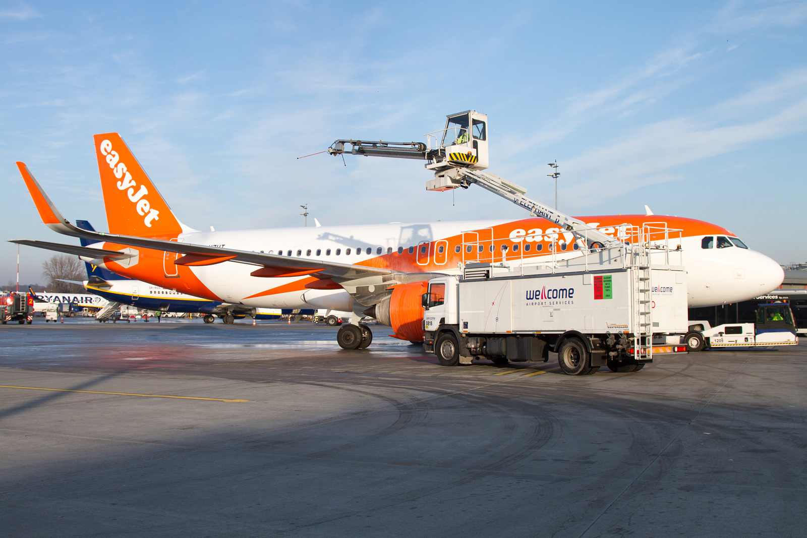 Odladzanie EasyJet w Krakowie